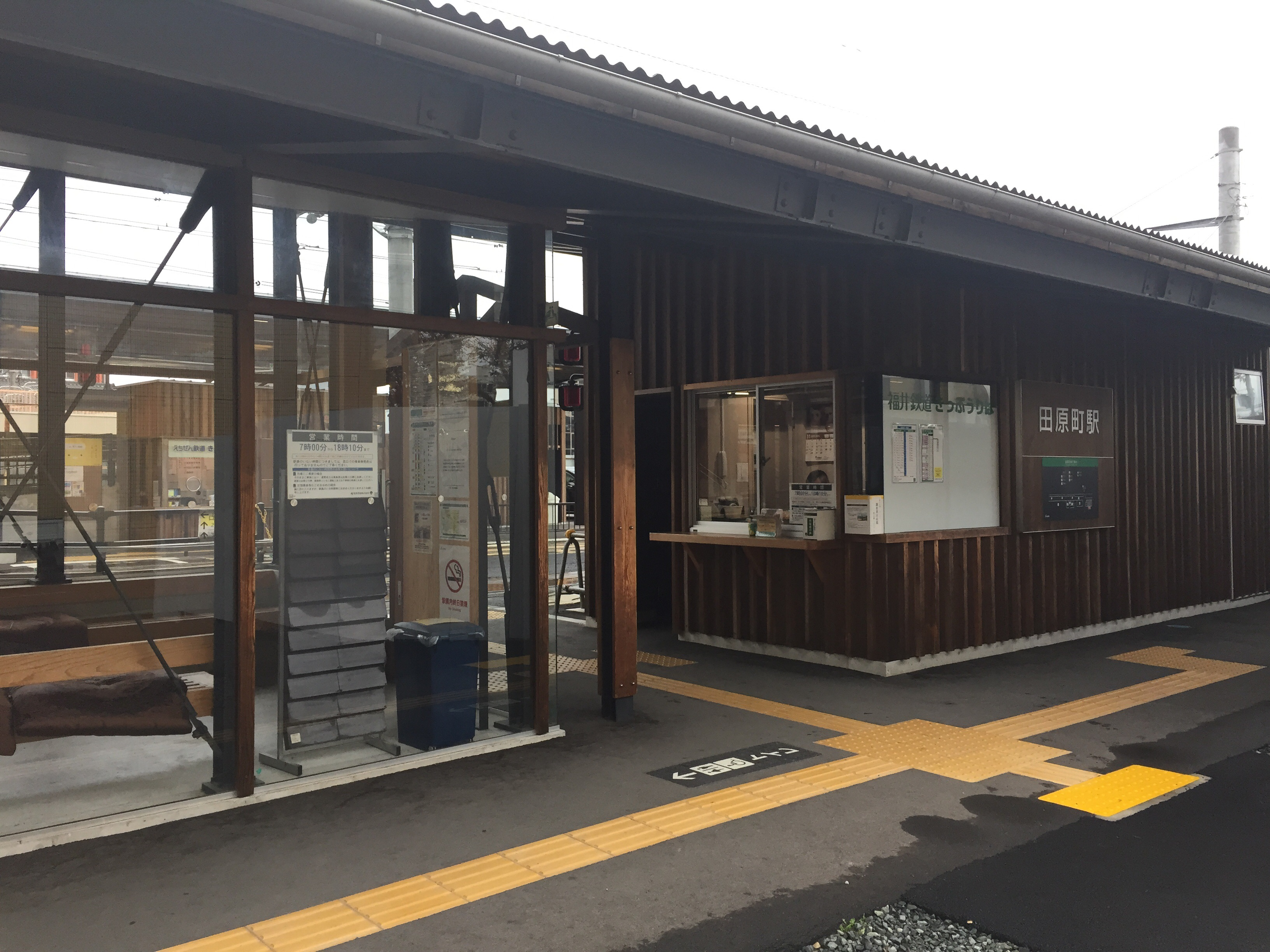 福井鉄道・えちぜん鉄道 田原町駅